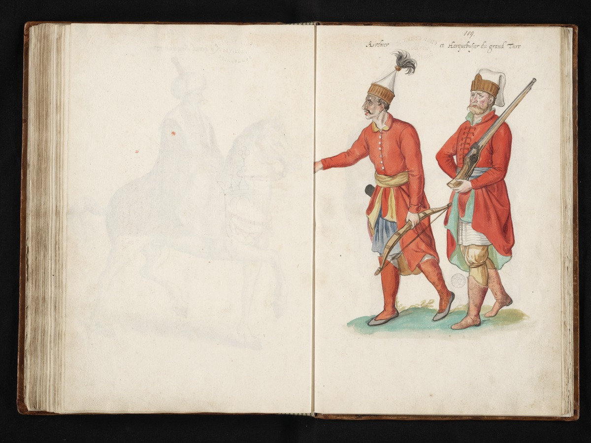 Акварель Лукаса де Геера из книги "Théâtre de tous les peuples et nations de la terre avec leurs habits et ornemens divers, tant anciens que modernes, diligemment depeints au naturel par Luc Dheere peintre et sculpteur Gantois".